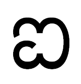 айкараву